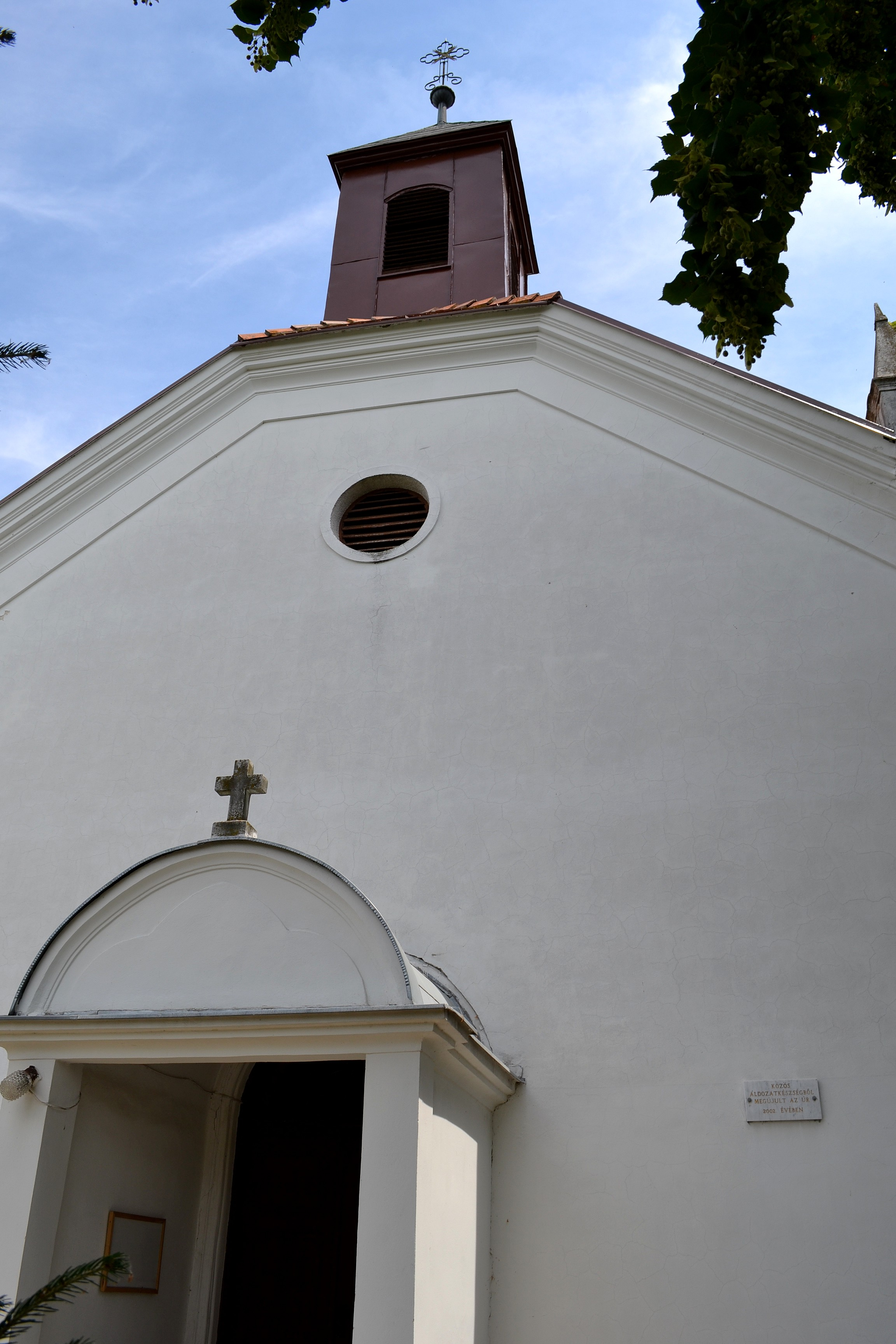 Kostol Všetkých svätých v Mierove; vstupná časť